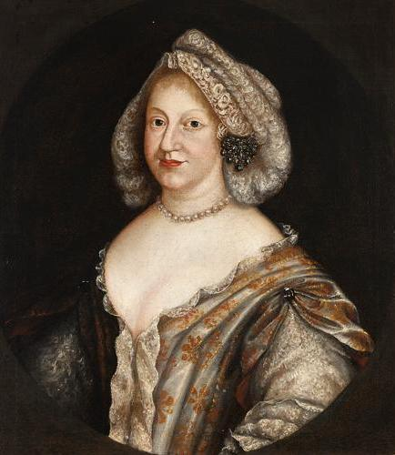 Wilhelmine Ernestine von Dänemark (1650-1706), Frau von Karl II.